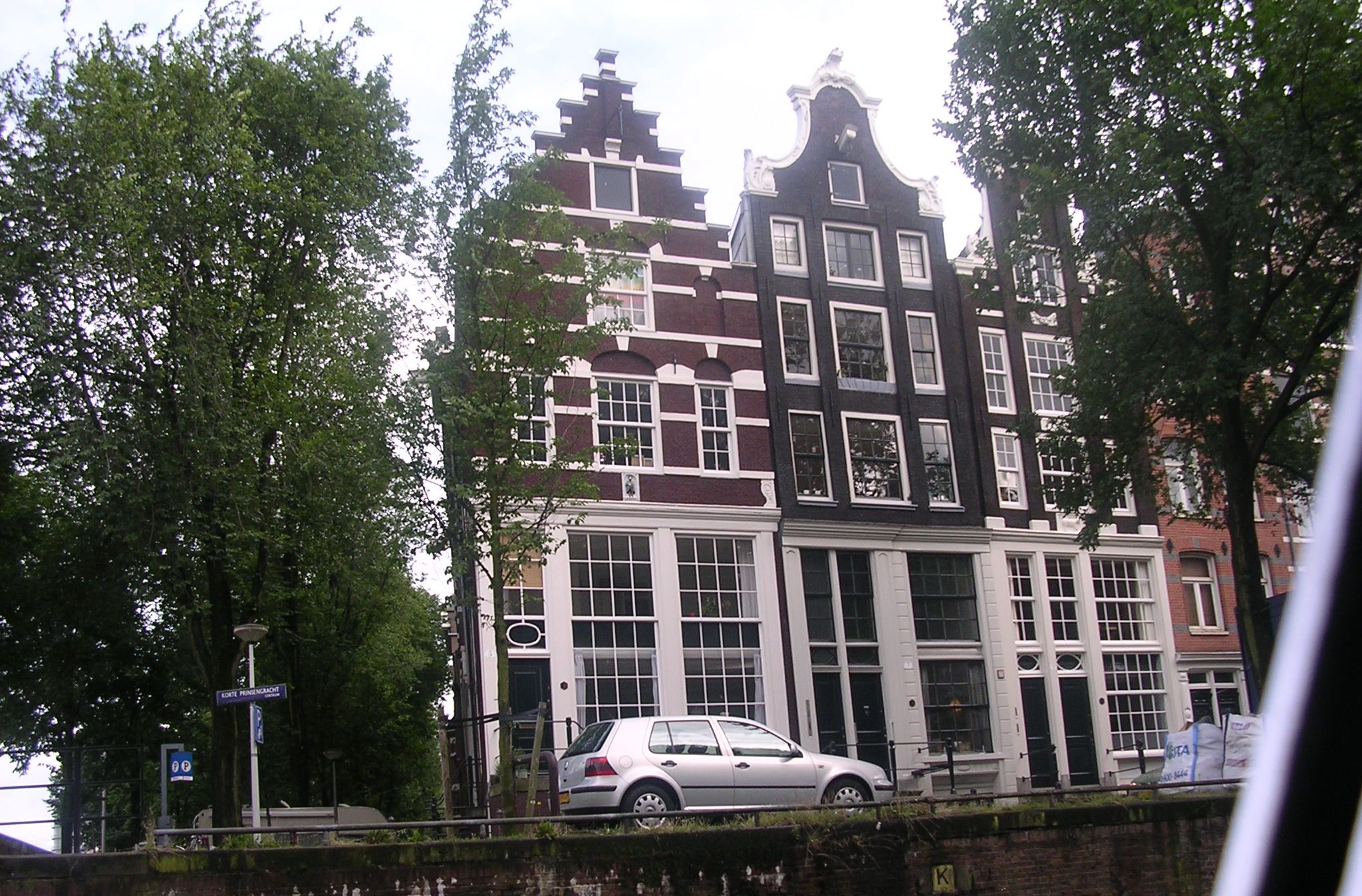 Grachtenpandjes aan de Amsterdamse gracht, 2005. Links: Korte Prinsengracht 5 uit ca. 1653.